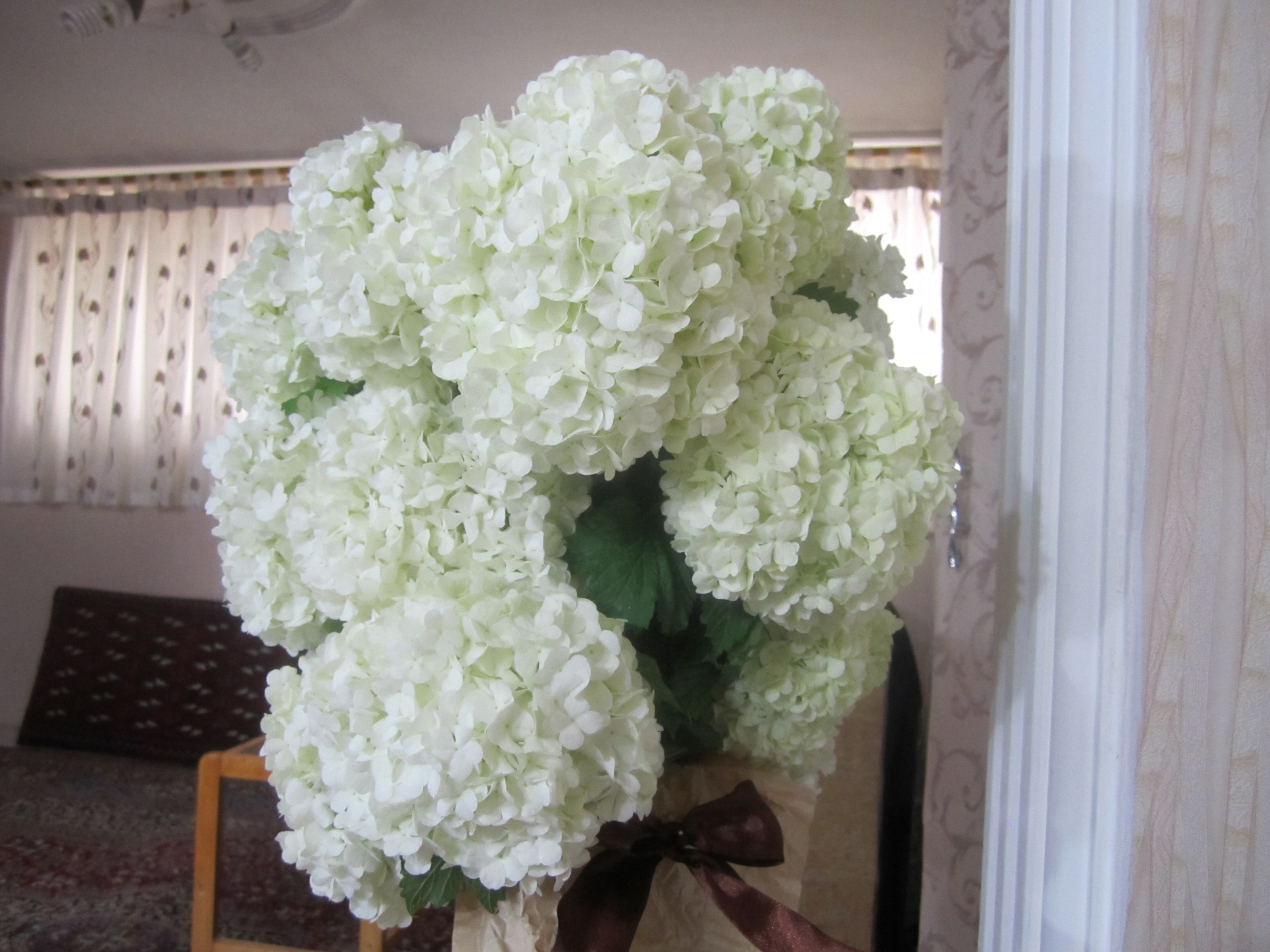 Skogsolvon